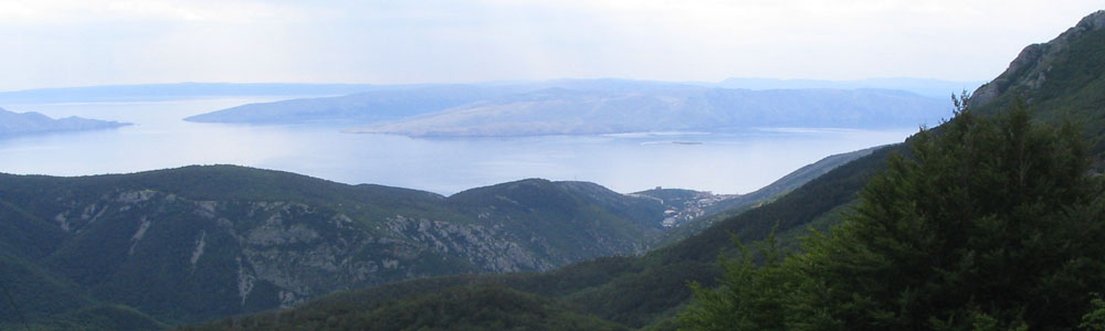 Prijevoj Vratnik: pogled na Krk i Senj